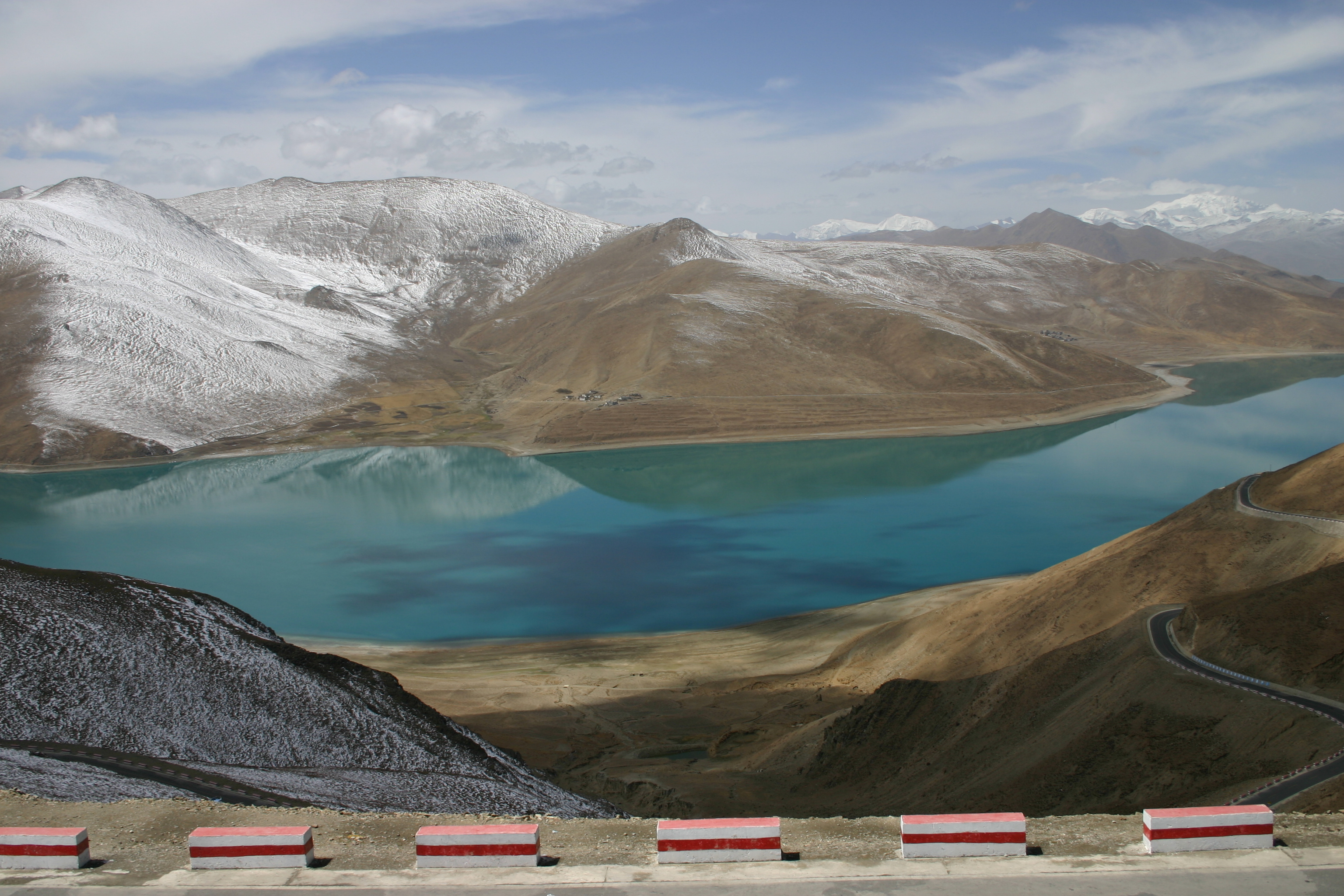 Yamdrok Lake